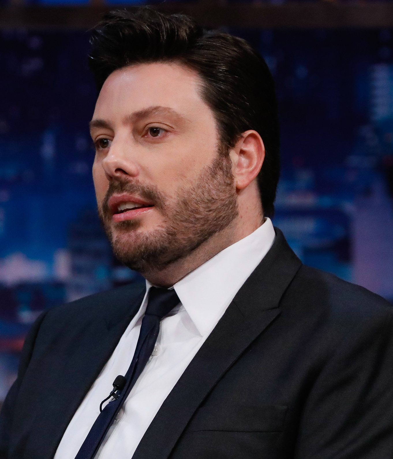 (São Paulo - SP, 30/05/2019) Entrevista ao Apresentador Danilo Gentili para o Programa The Noite do SBT, gravada dia 29 de maio. Foto: Alan Santos/PR